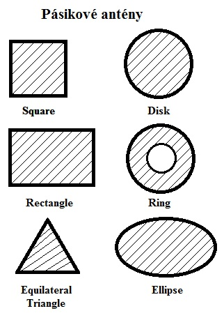 Tvary mikropásikových antén